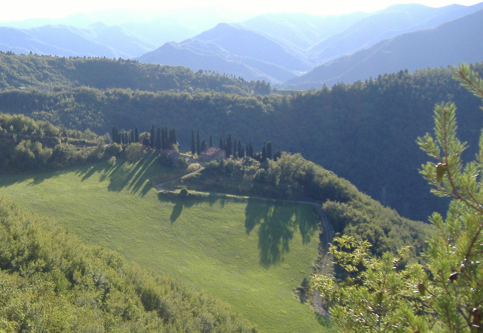 L’Appennino nella Valle del Senio